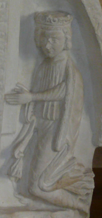 Tympanon kláštera sv. Jiří (sádrový odlitek)- klečící Přemysl Otakar I.